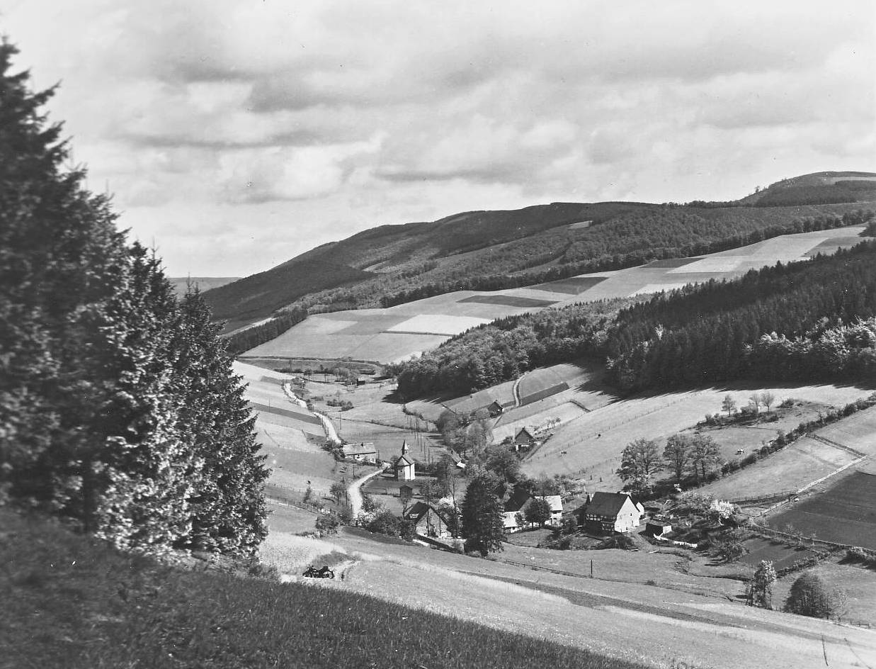 Valmetal südlich von Bestwig-Ramsbeck mit Obervalme.